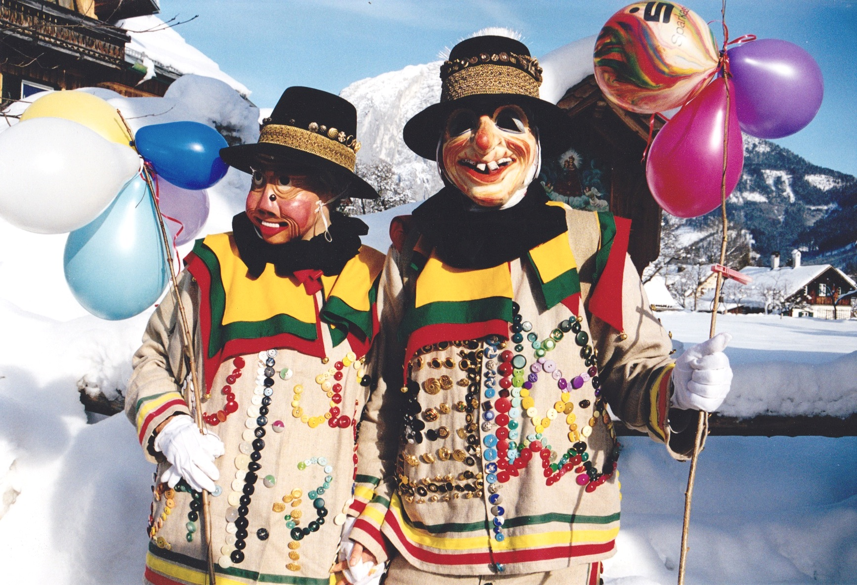 Altausseer Knopferln zur Faschingszeit, Aufnahme aus dem Jahr 2001